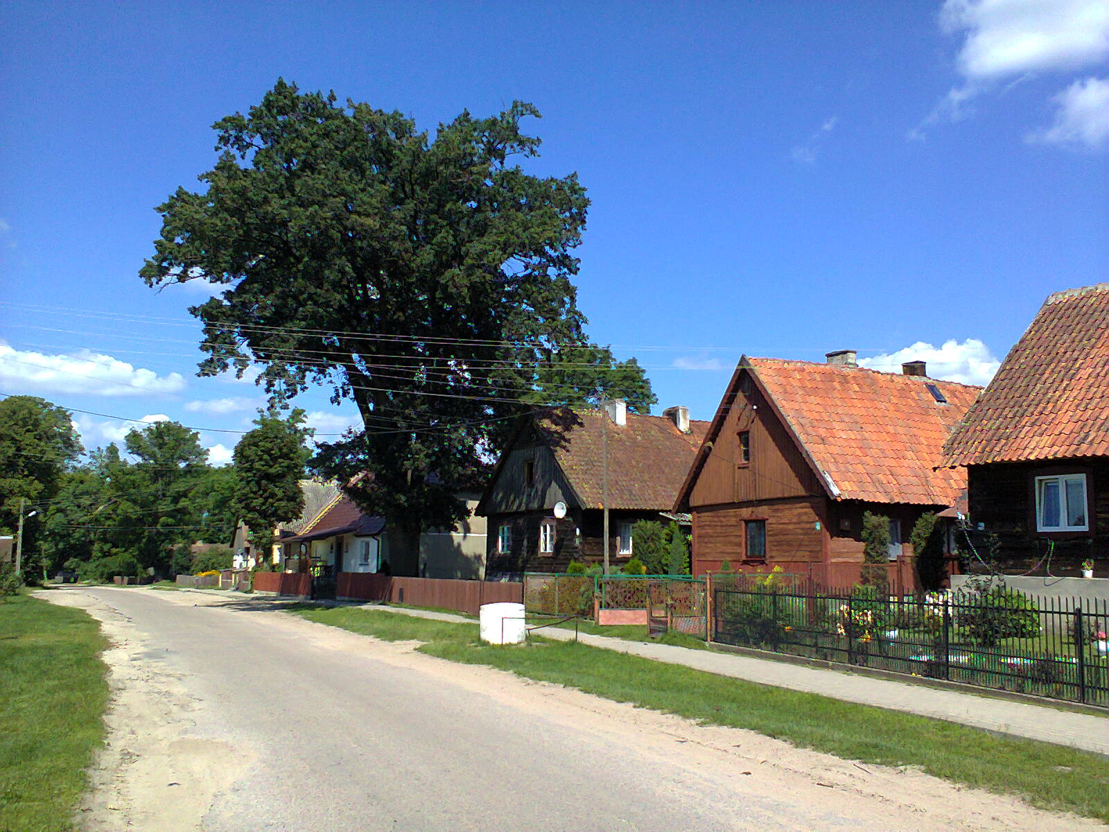 Klon (powiat szczycieński)